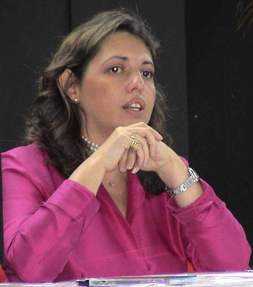 Conferencia